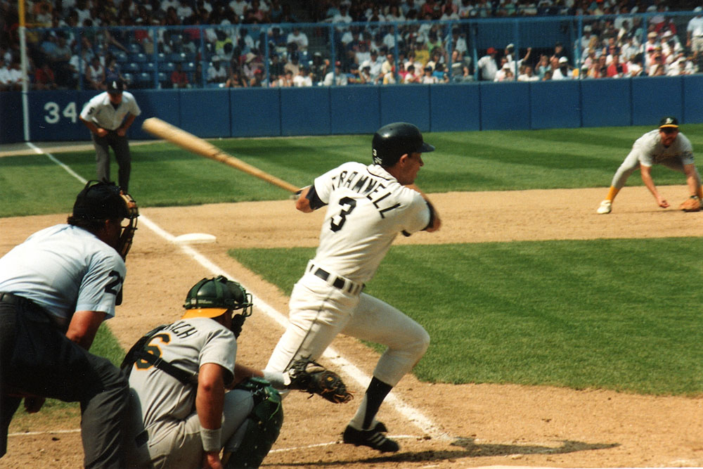 1984 World Series Hero, Alan Trammell 1991 Tiger Stadium - Detroit, MichiganAlan Trammell